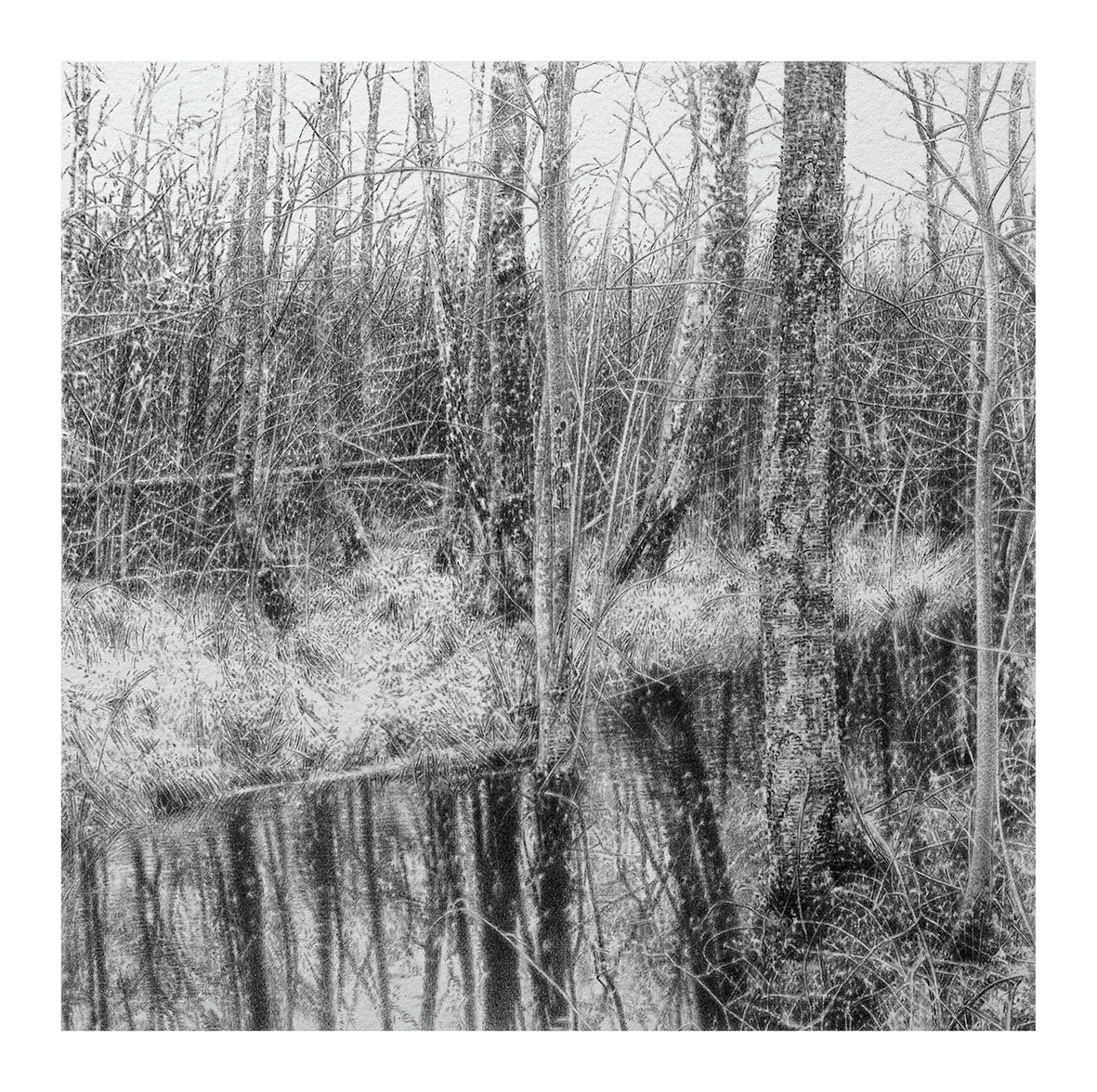 Zeichnung, Bleistift auf Papier, 21cm x 21 cm, Darstellung einer Naturlandschaft ohne menschlichen Zugriff